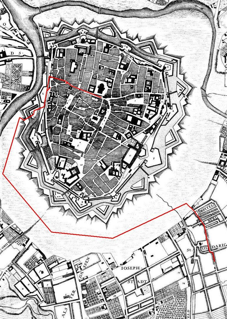 Ungefährer Transportweg der alten Pummerin im Jahre 1711. Es wird berichtet vom "Stadttor beim roten Turm". Alle guten Quellen beziehen es auf die "obere Fallen" / das Fischertor. Es hat einen einzelnen breiteren Bogen, die "untere Fallen", das spätere neue Rotenturmtor dagegen zwei. Es wird auch berichtet, dass schon lange Zeit vorher ein Handwerker den Auftrag erhielt alle Gewölbe vom Roten Turm (später altes Rotenturmtor) bis zum Stephansdom zu kontrollieren und notfalls zu verstärken.Es bestünde noch die kleine Möglichkeit, dass etwas in der Linie der mittelalterlichen Stadtmauer abgebrochen worden wäre (was auch 1710 noch nicht im Plan verzeichnet ist) und der geplante Weg geändert wurde, dann hätte man nicht durch den roten Turm müssen. Das ist mit den zwei kleinen Abzweigern angedeutet.Die Werstatt ist absolut im richtigen Rechteck knapp oberhalb der Ulrichskirche.Ausschnitt aus: Grundrissplan von Wien mit seinen Vorstädten und dem Linienwall. 1704 (1706 gestochen und gedruckt) Kupferstich, Maßstab 1 : 5400, Ausrichtung nach Ostsüdost. Erster exakter Plan von Wien, der auch sämtliche Vorstädte umfasste.